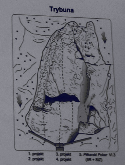 Skałoplan skały Trybuna w Dubiu